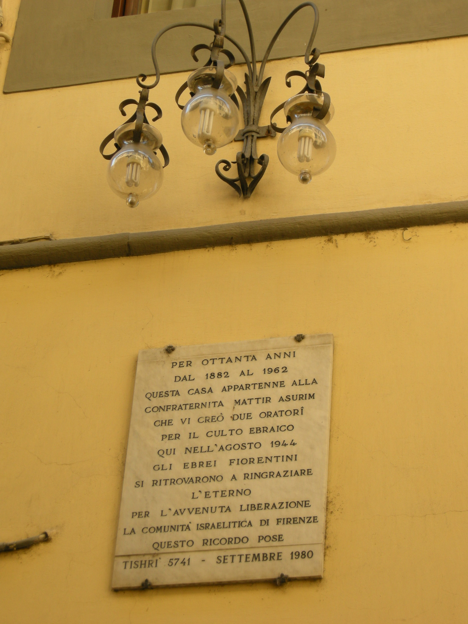 Via delle oche, targa sinagoghe